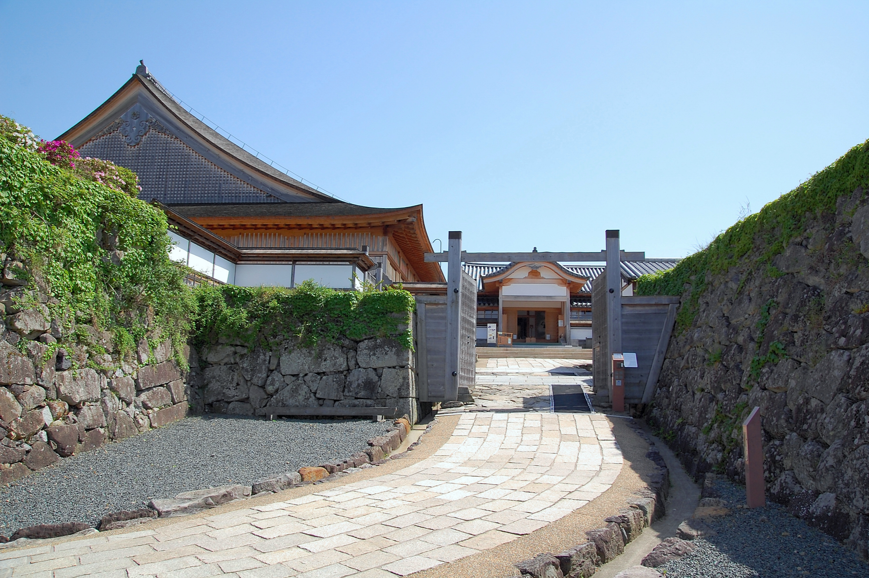 篠山城鉄門跡（くろがねもんあと）から